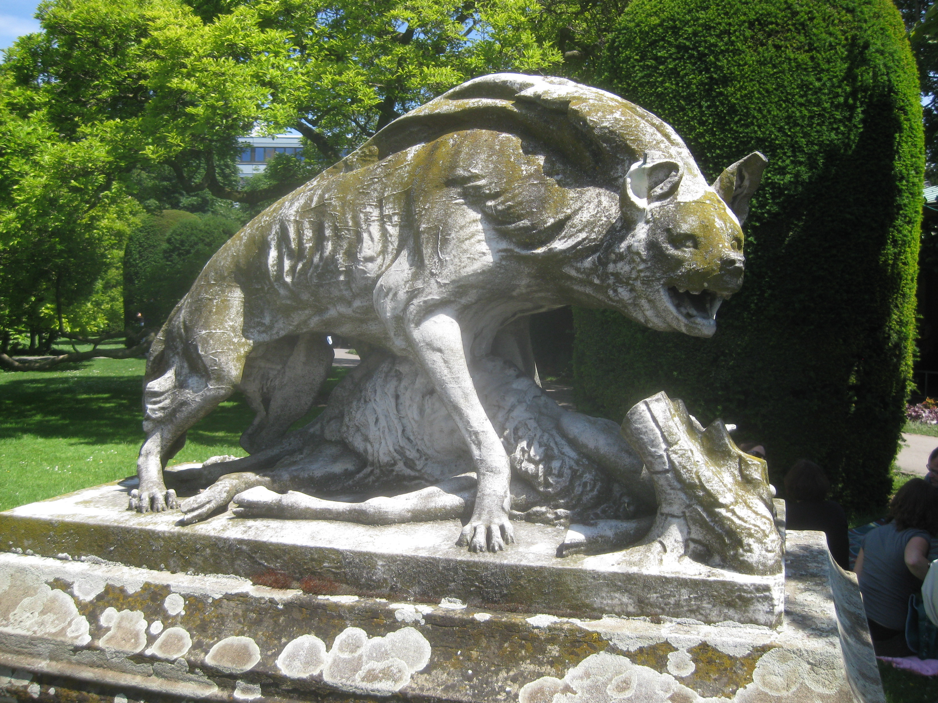 Albert Güldenstein: Hyäne mit einem geraubten Lamm, Marmor, Entstehungsjahr 1857, Stuttgart, Wilhelma, am Großen Bassin.